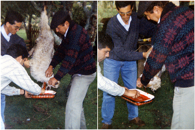 Hombres extrayendo la sangre de un cordero para consumirla como ñachi, bebida típica de algunas zonas de Chile. This image (or all images in this category/page) is very small, unfixably too light/dark, or may not adequately illustrate the subject of the picture. If a higher-quality image is available please consider replacing this one; otherwise, a replacement under a free license should be found or provided. Please see Category:Image cleanup templates for templates used to mark images that only need a clean-up. For more help, see Commons:Media for cleanup#Low quality pictures.